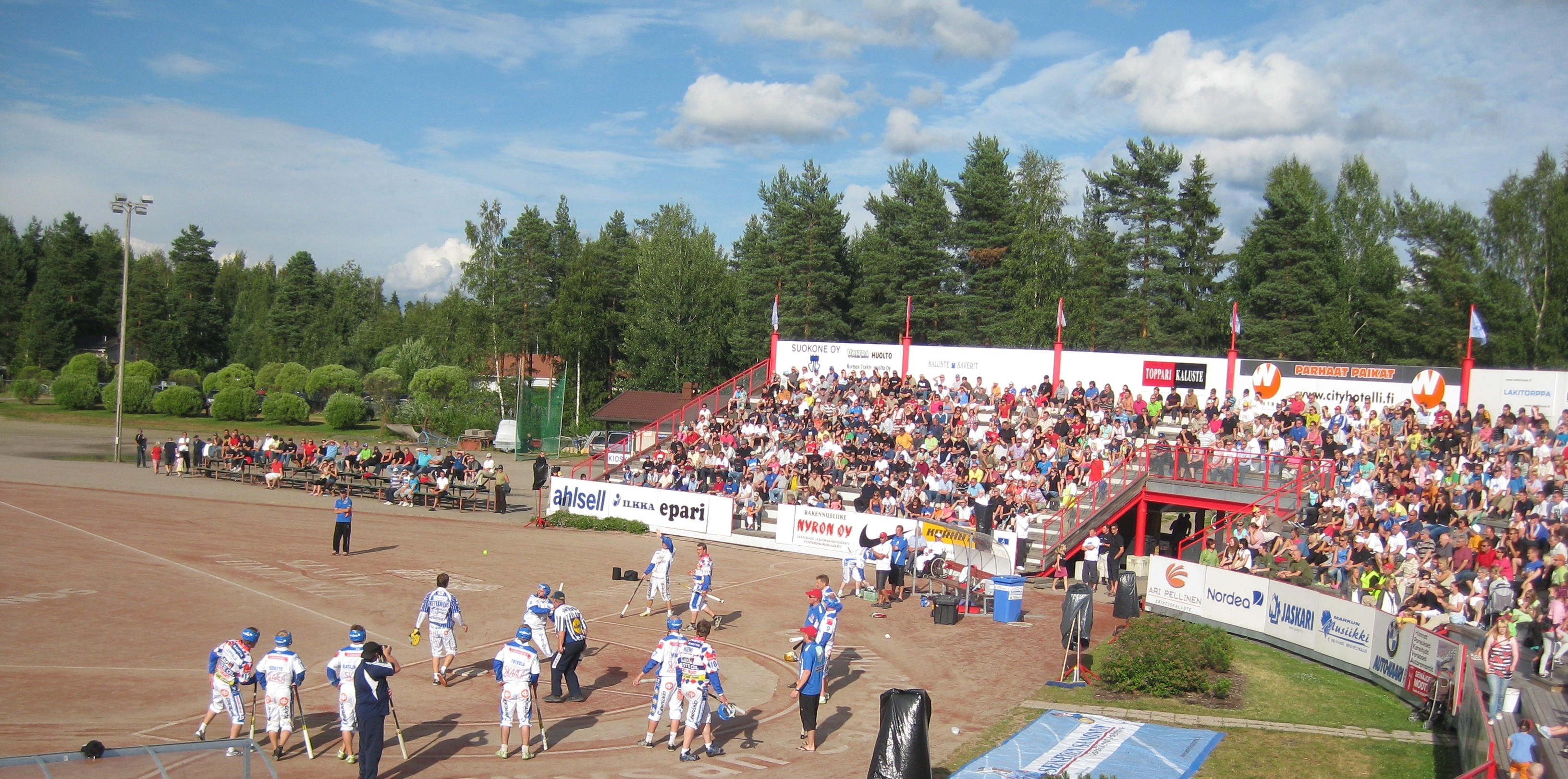 Skaala-areena heinäkuussa 2010, meneillään ottelu Nurmon Jymy - Vimpelin Veto.